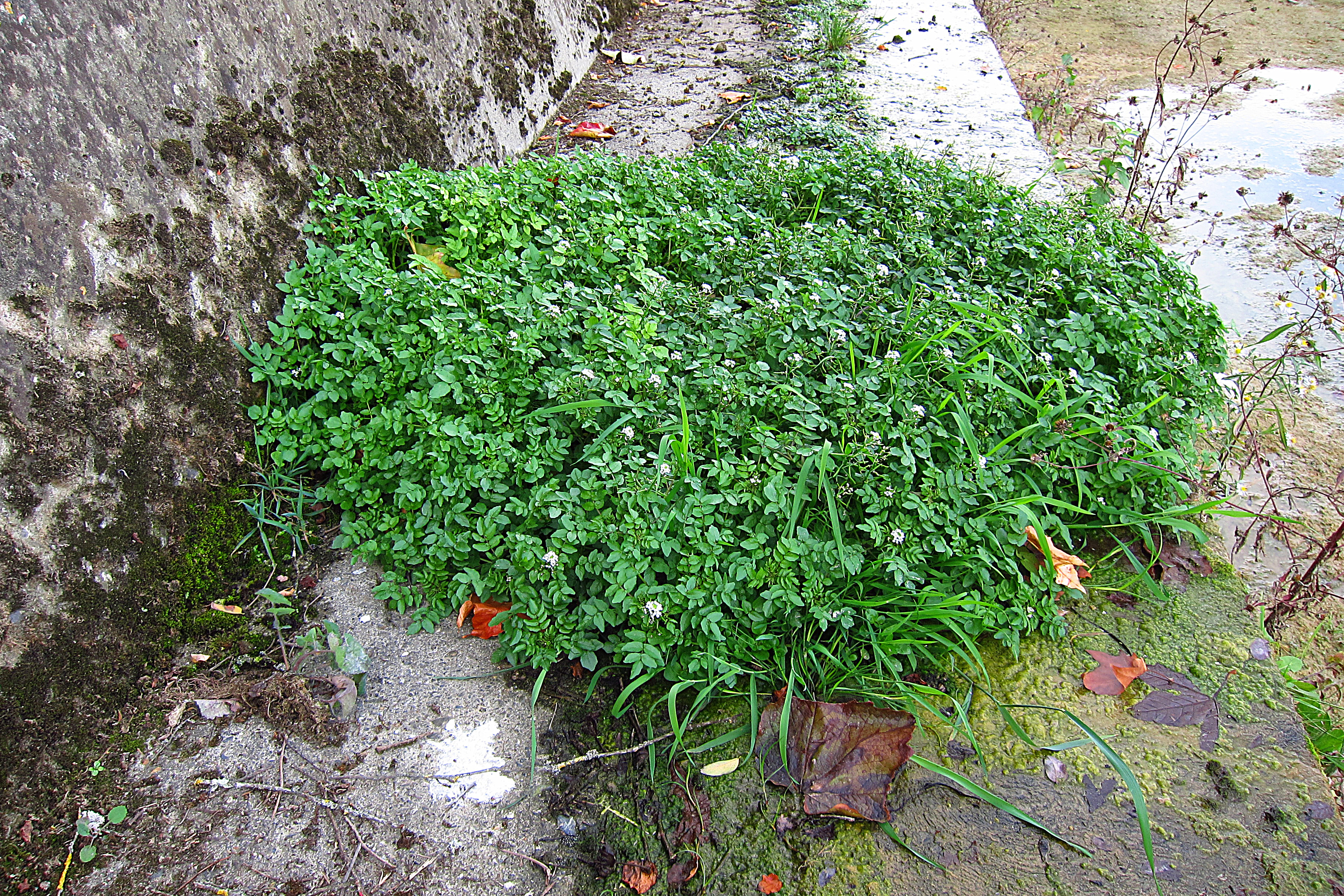 Toulouse (Haute-Garonne, Midi-Pyrénées, France) : Cresson (Nasturtium officinale) dans une source du bord de la Garonne.